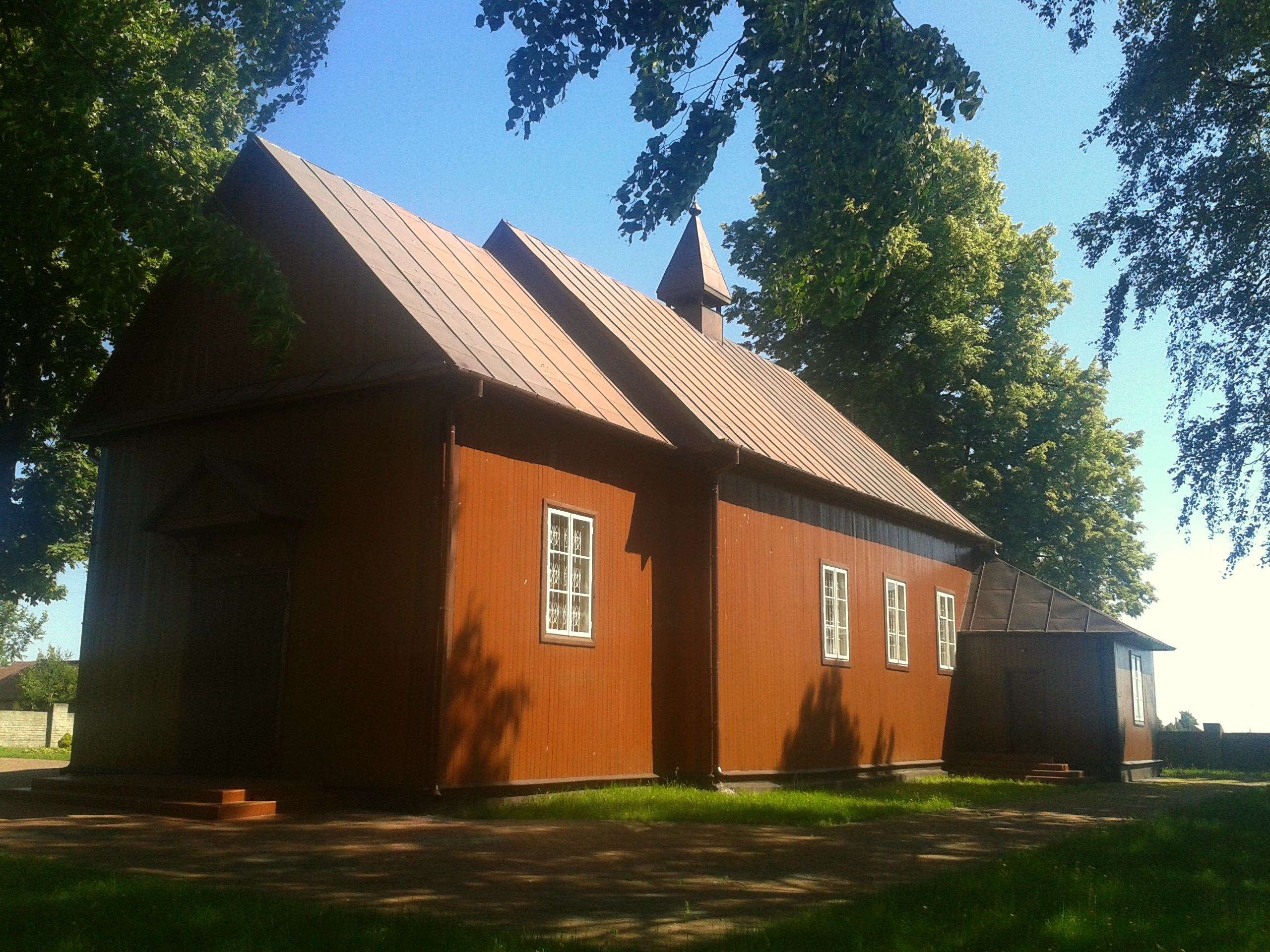 Kościół w Dokudowie